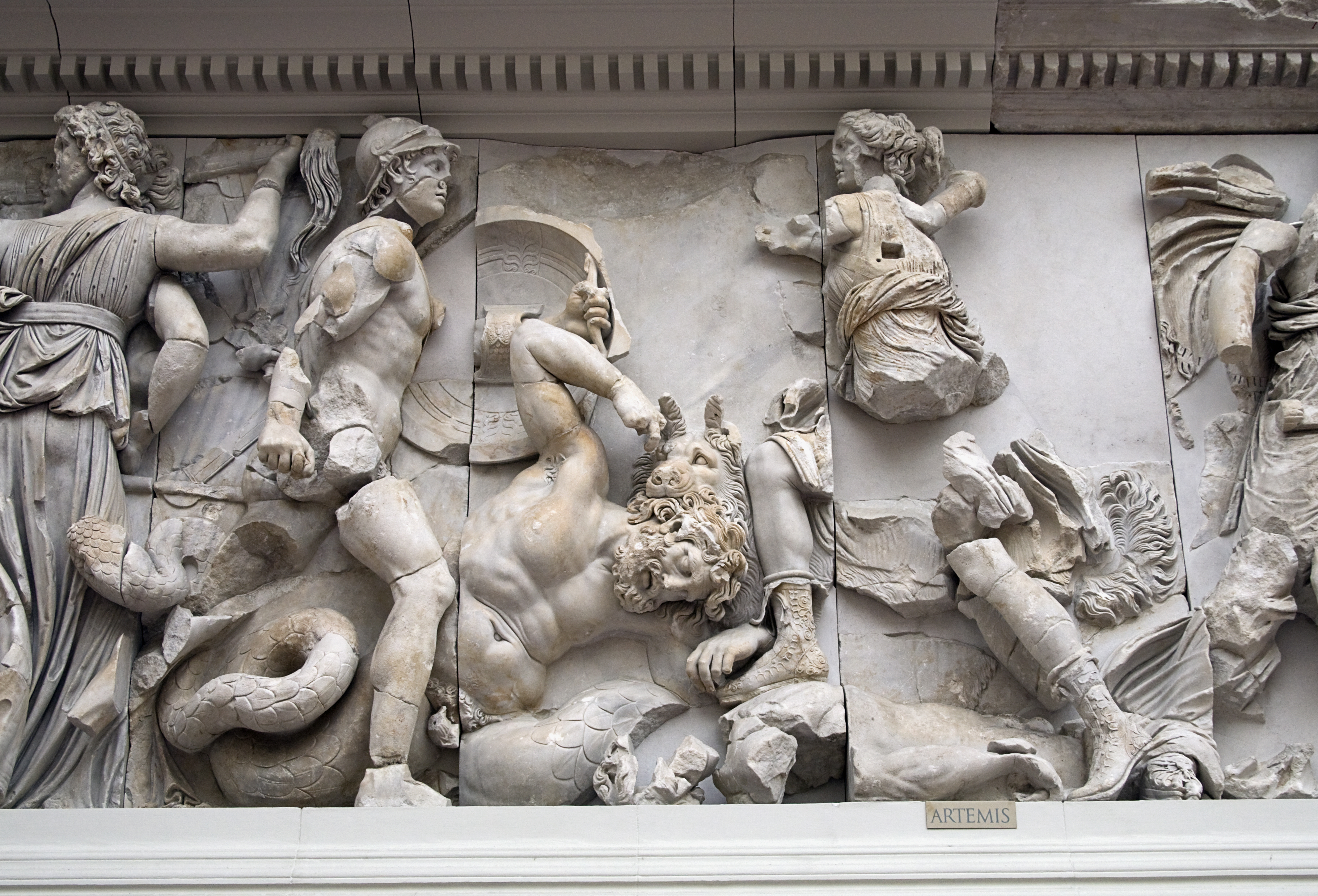 Pergamon Altar Gigantomacy frieze, Artemis